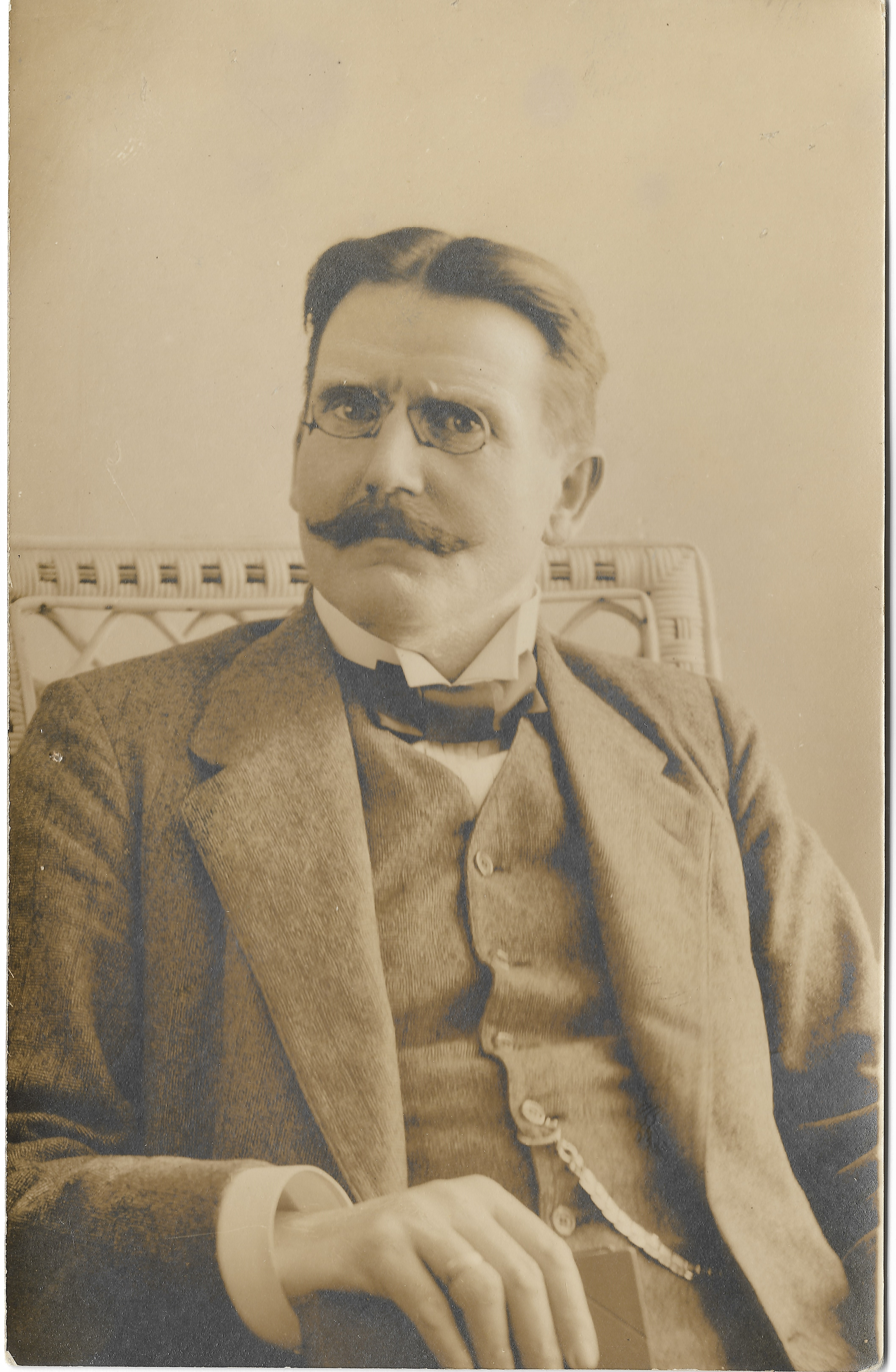 W czasie pobytu w Holandii.